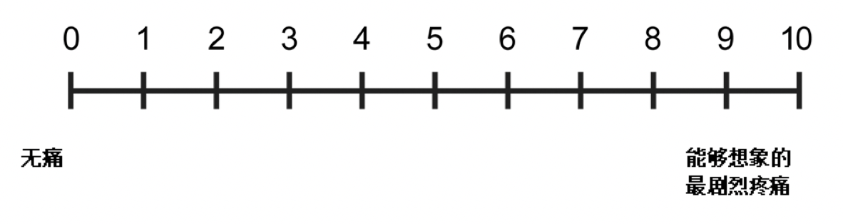 中文（中国大陆）: 《癌症疼痛诊疗规范（2018年版）》疼痛程度数字评估量表